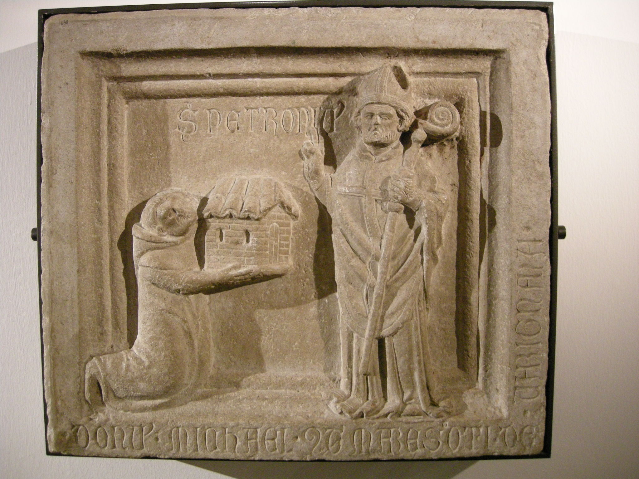 Michele Marescotti offre una cappella a San Petronio. Rilievo della prima metà del sec. XIV, da Palazzo Pizzardi, oggi esposto nel Museo civico medievale a Bologna. Numero d'inventario: 1638.